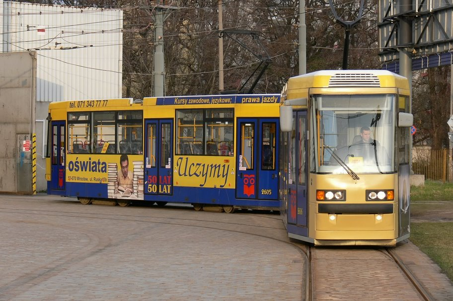 Protram 204WrAs we Wrocławiu.